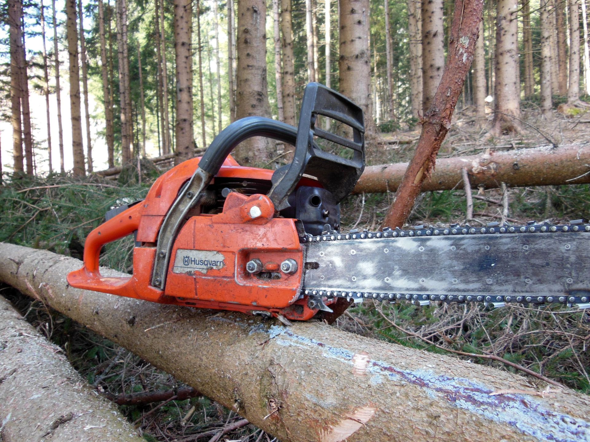 Motorsäge